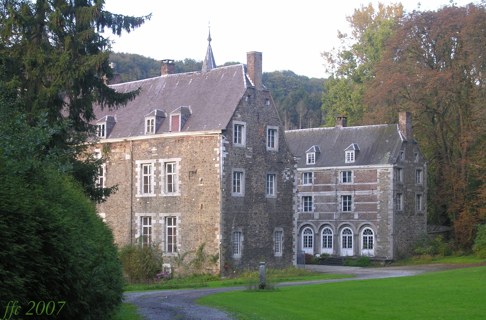 Castell de Bolland (Liège)